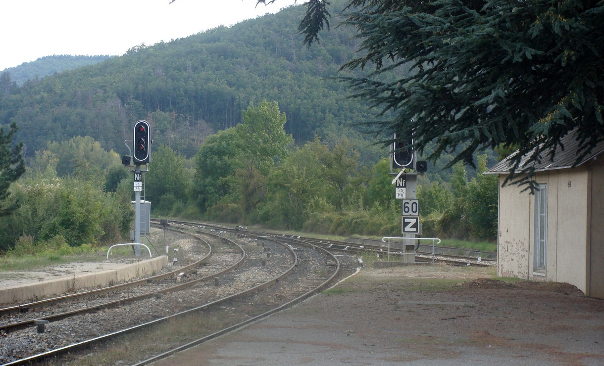 Sortie de gare d'Aspres-sur-Buech et jonction avec les voies de Livron, vues depuis le quai départ Grenoble